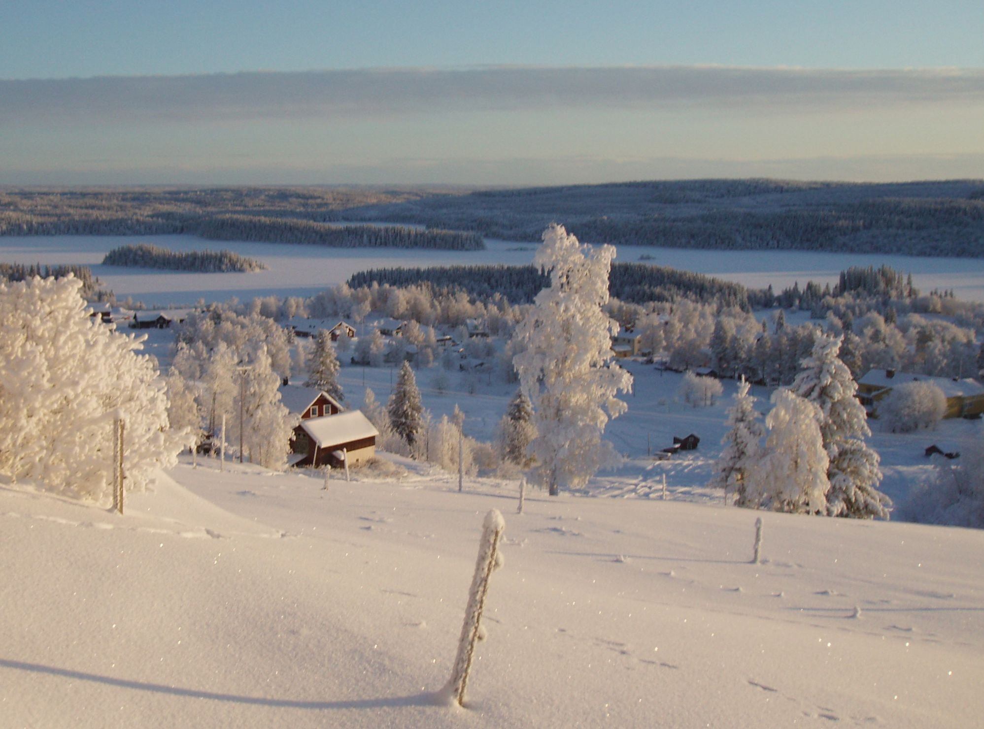 Laxsjö, Föllinge, Sweden